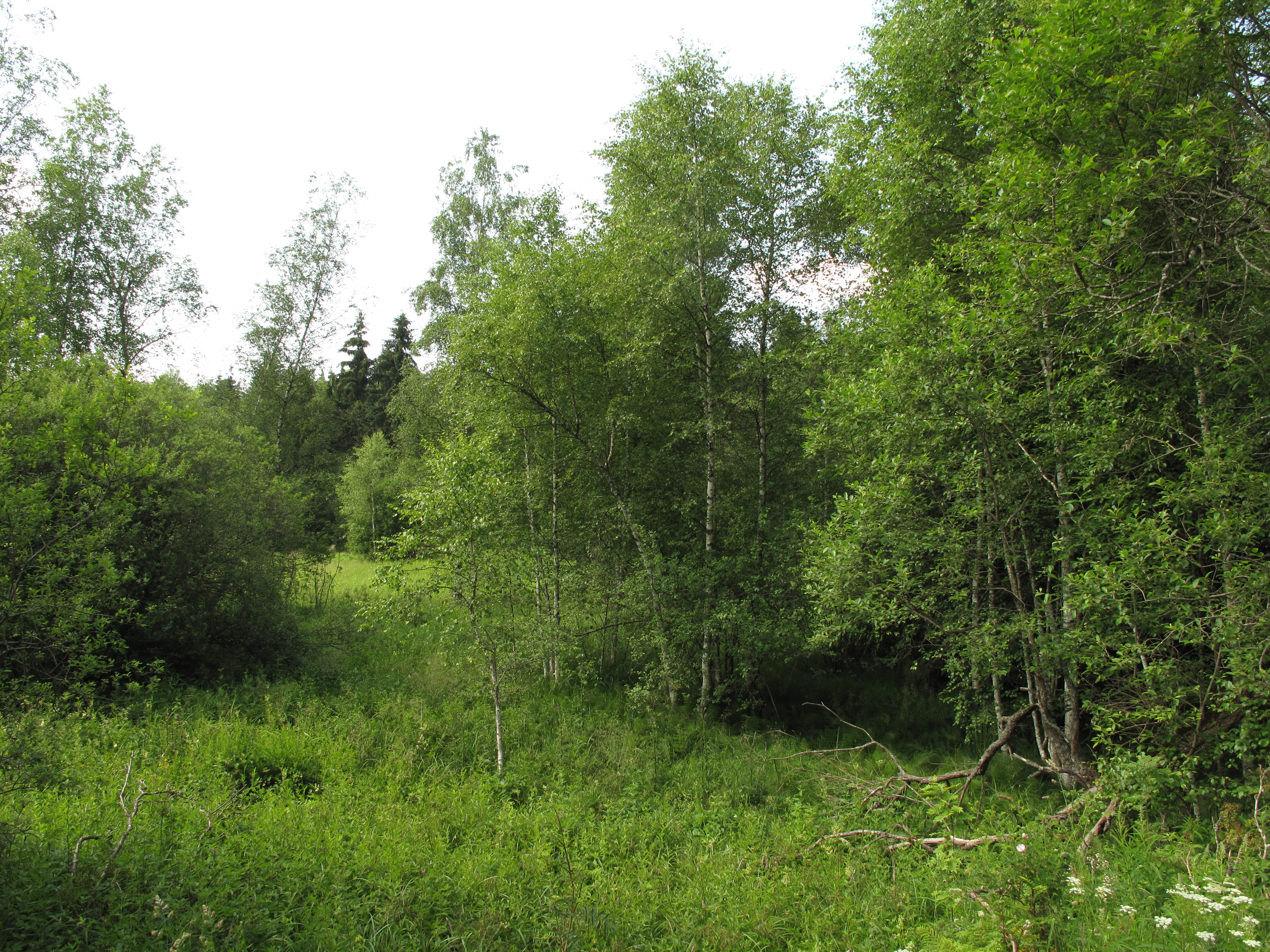 Přírodní rezervace Niva Horského potoka. Okres Český Krumlov, Česká republika.